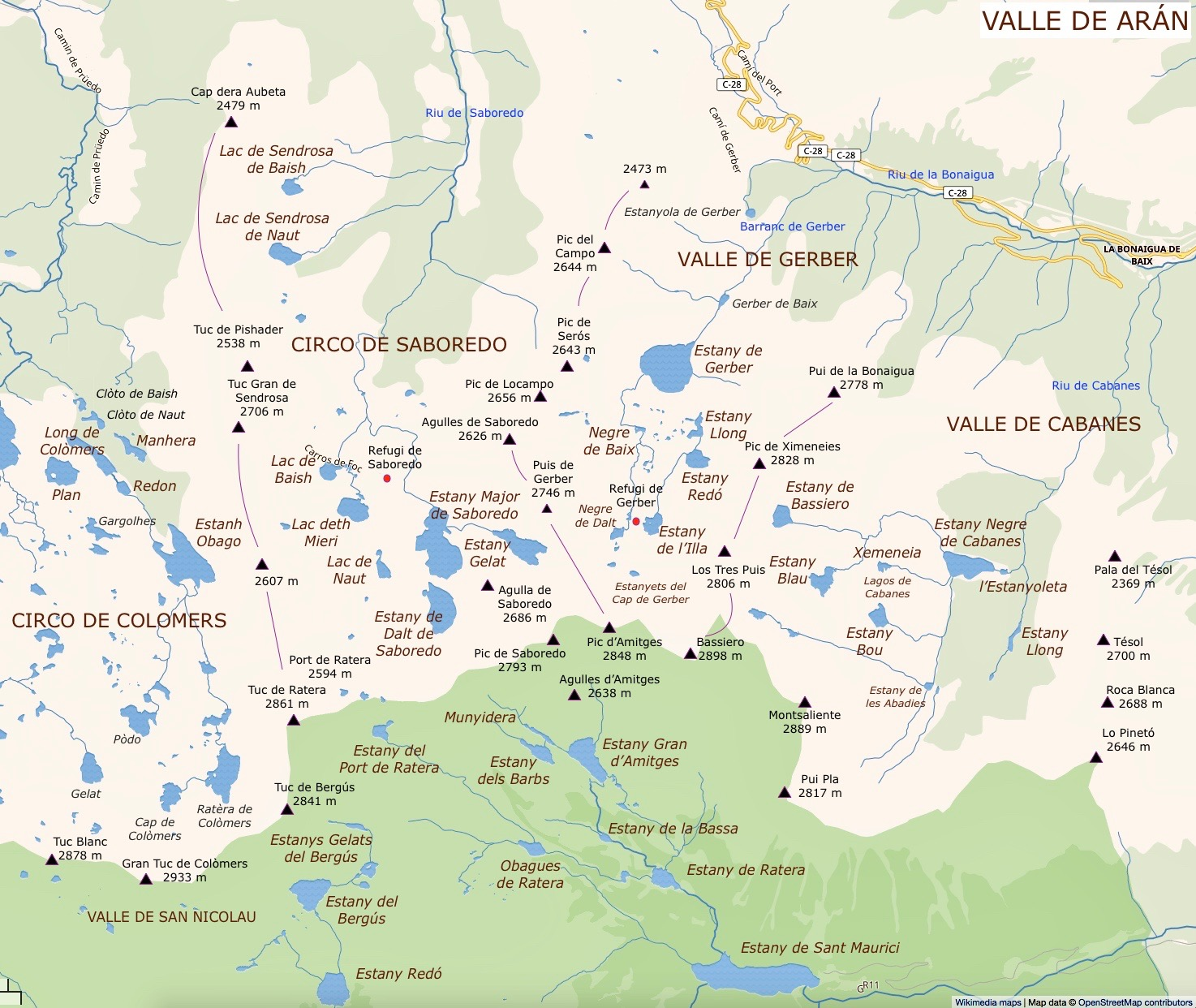 Mapa de los circos Saboredo y Colomers y los valles de Gerber y la Cabana